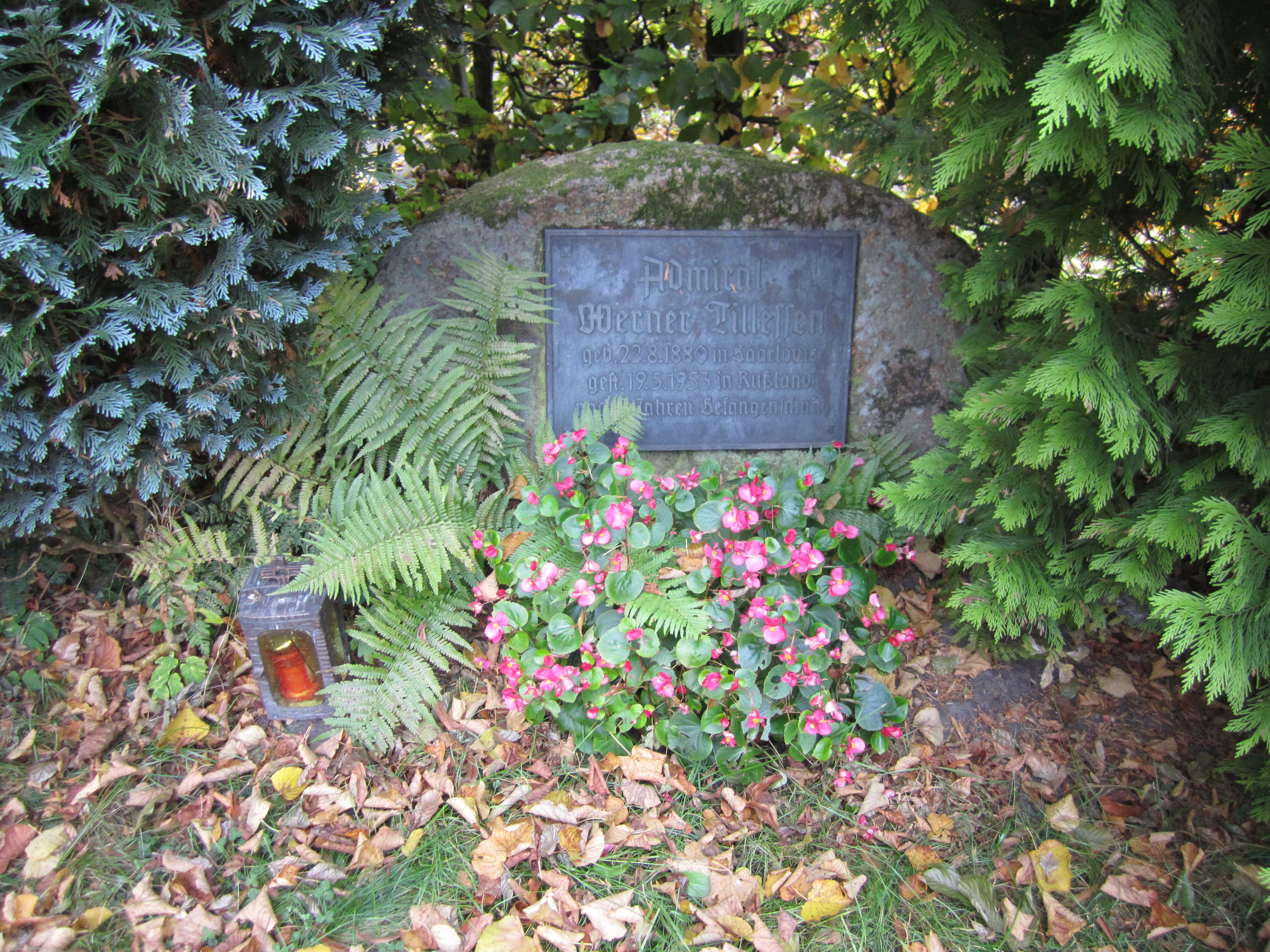 Gedenkstein für Admiral Werner Tillessen